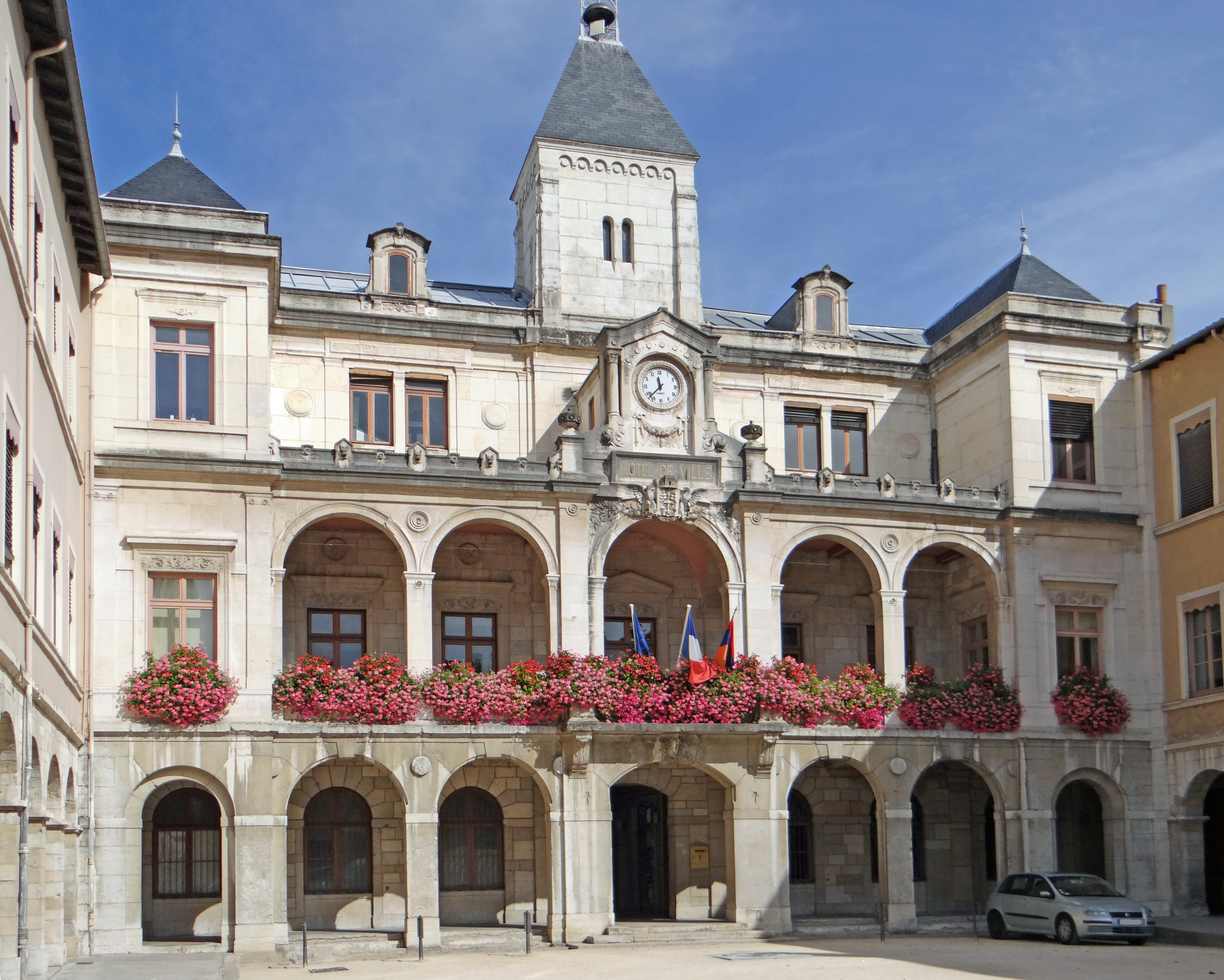 Vienne (Isère) - Hôtel de ville